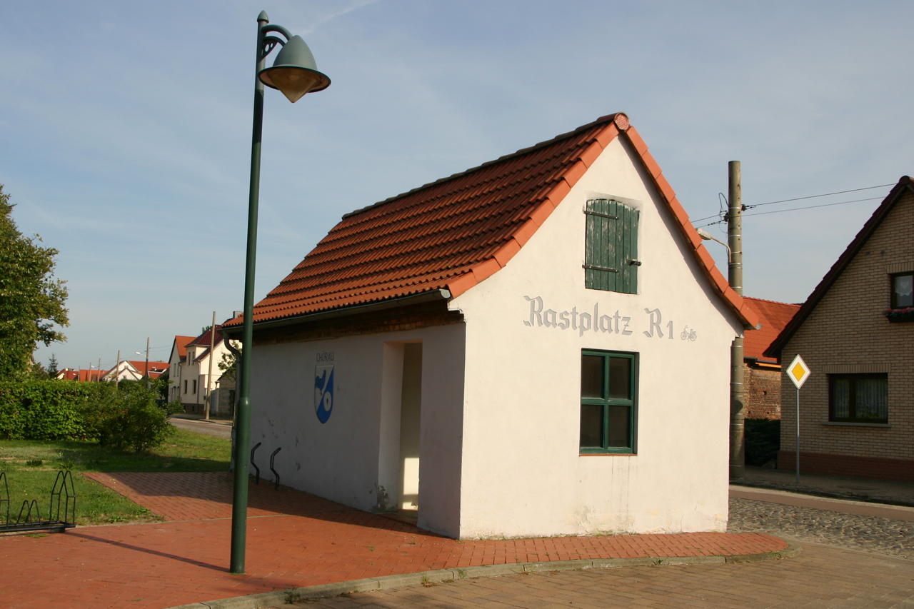 Chörau ist ein Ortsteil der Gemeinde Osternienburger Land im Landkreis Anhalt-Bitterfeld in Sachsen-Anhalt.